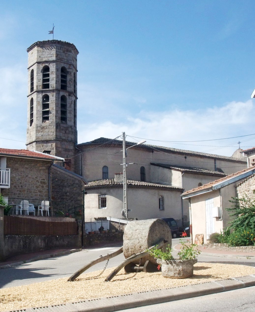 Roiffieux église extérieur